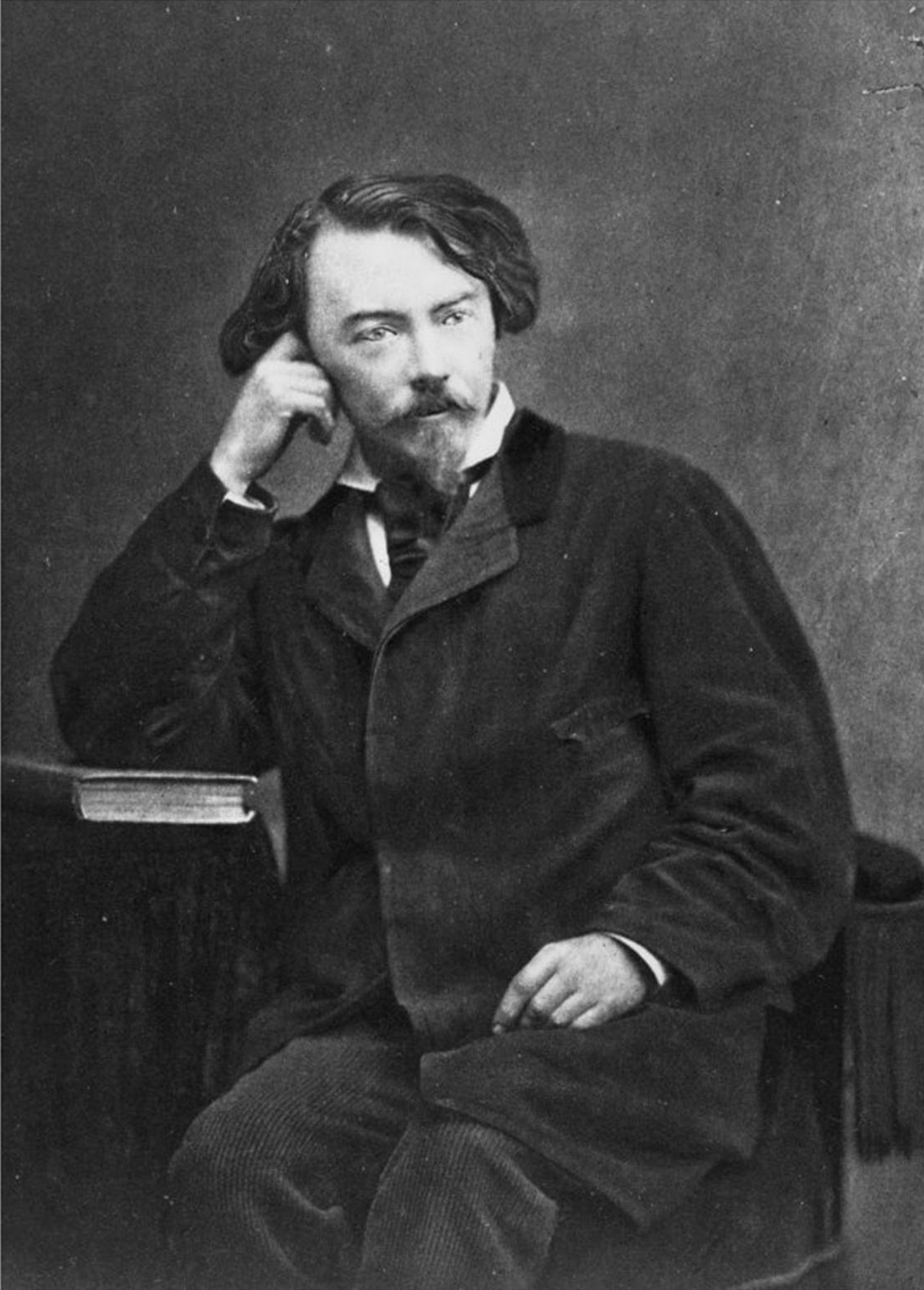 French writer Auguste de Villiers de L'Isle-Adam (1838-1889)